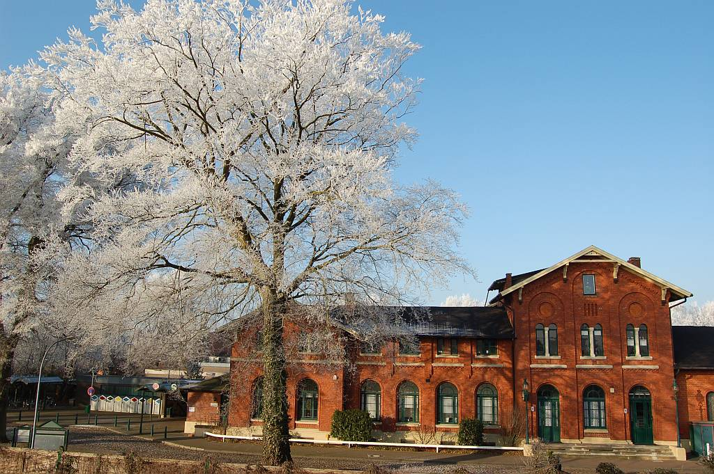 Bahnhof Hittfeld in Emmelndorf, Niedersachsen im Winter